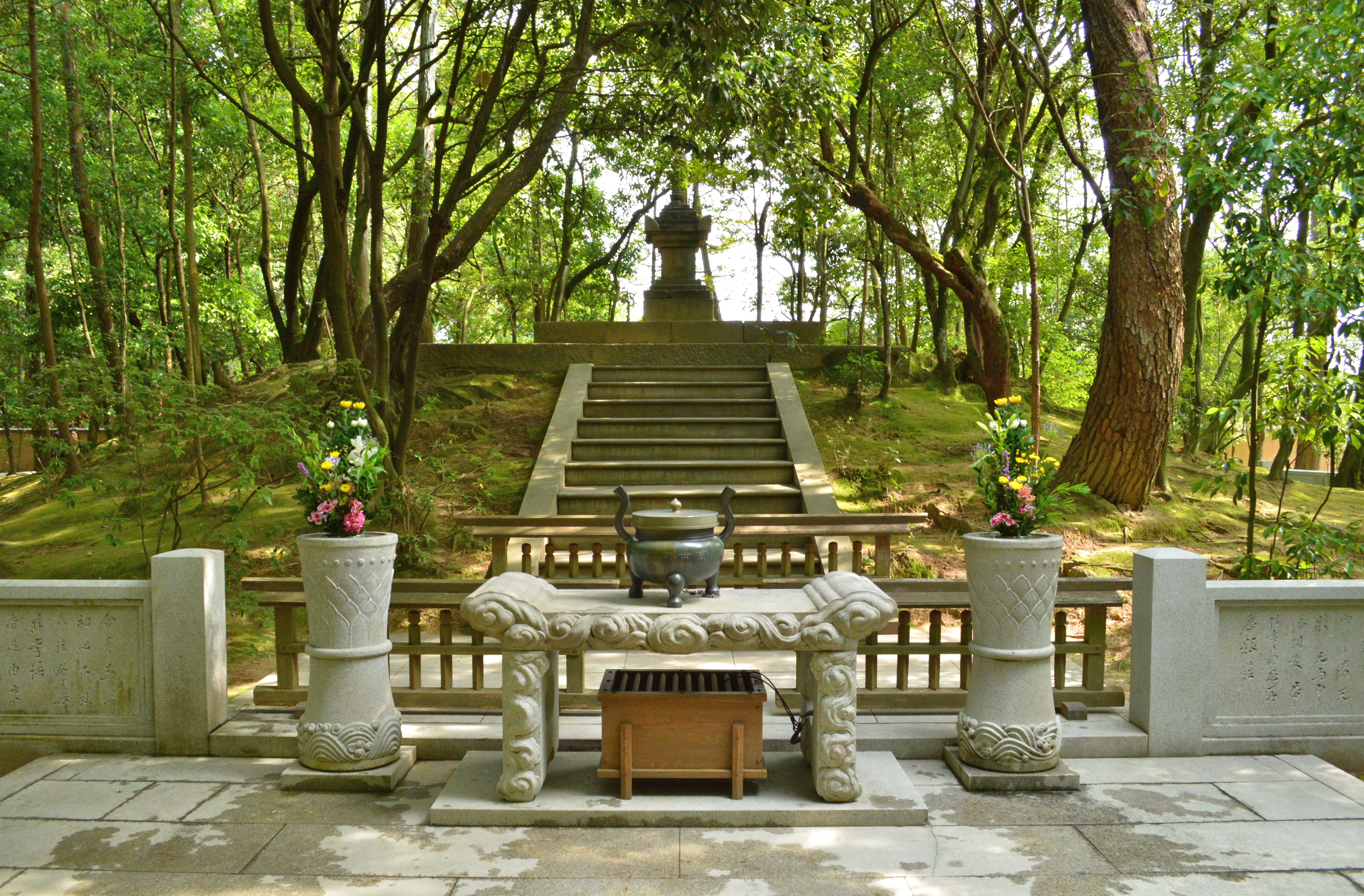 唐招提寺 鑑真御廟